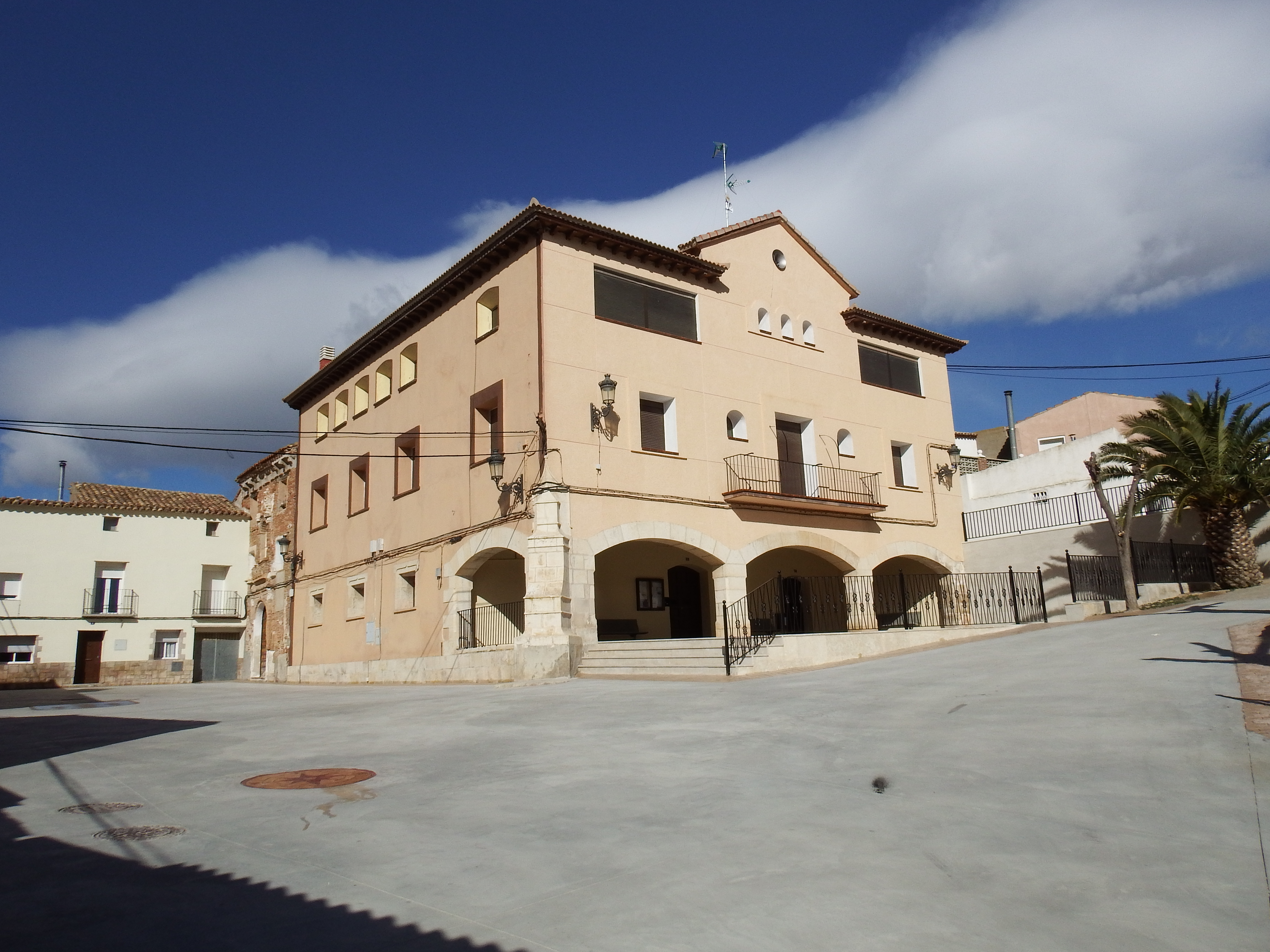 La Puebla de Albortón, Ayuntamiento